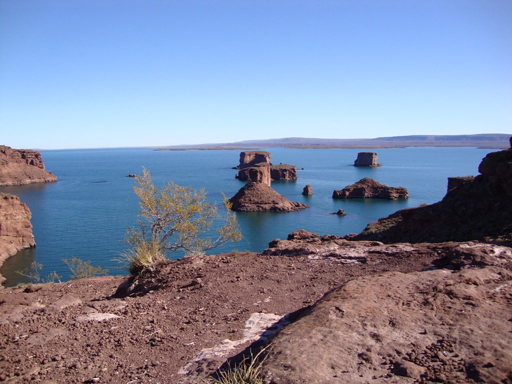 Los Gigantes. Vista desde el Acantilado de la Suegra. - El Chocón - Río Negro - Argentina